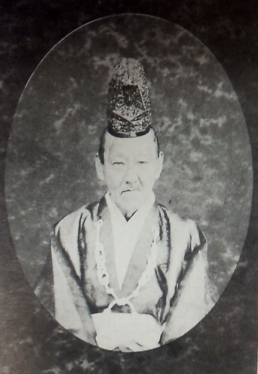 五辻高仲の肖像写真。